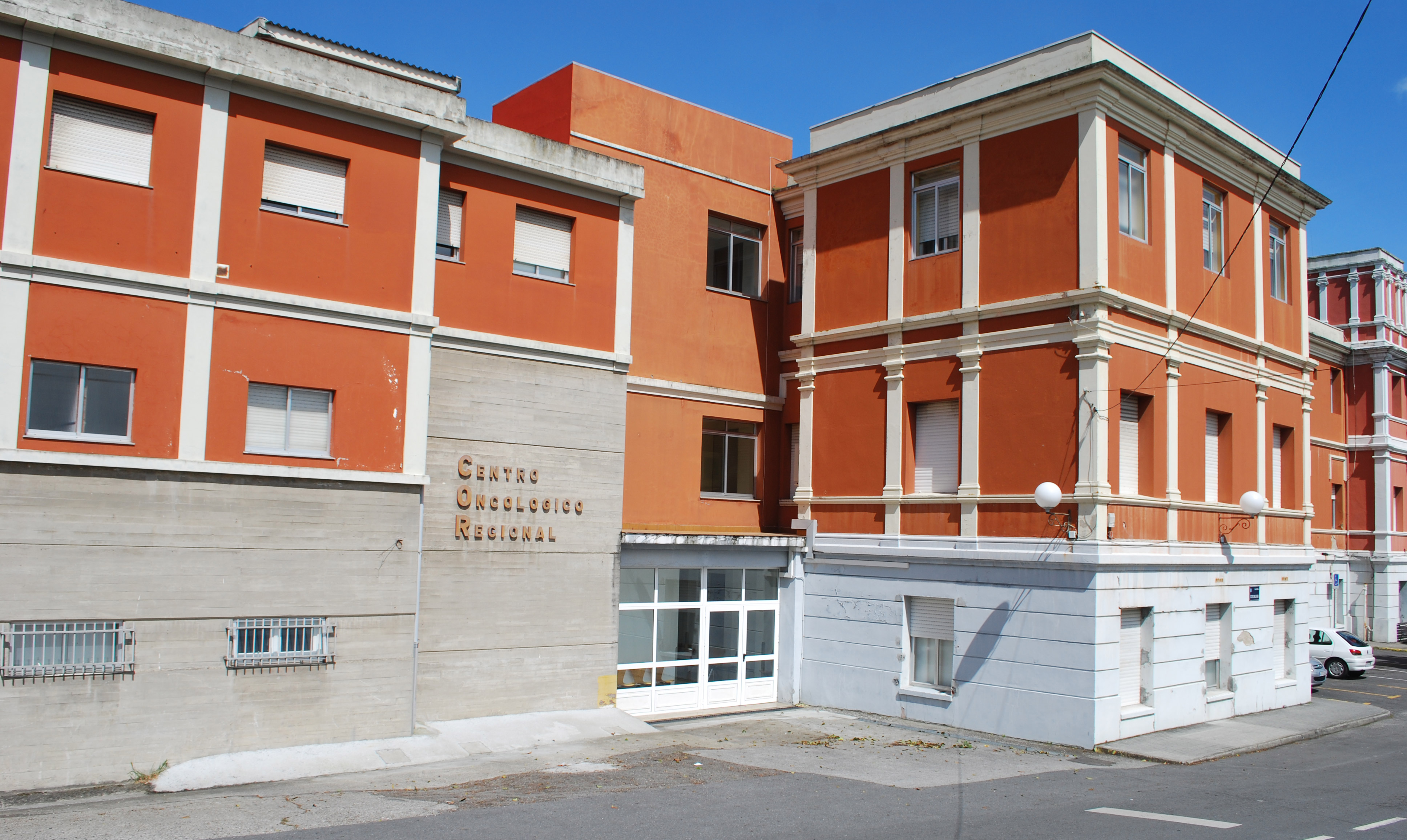 Labaca, Hospital Oncolóxico Rexional Galiza